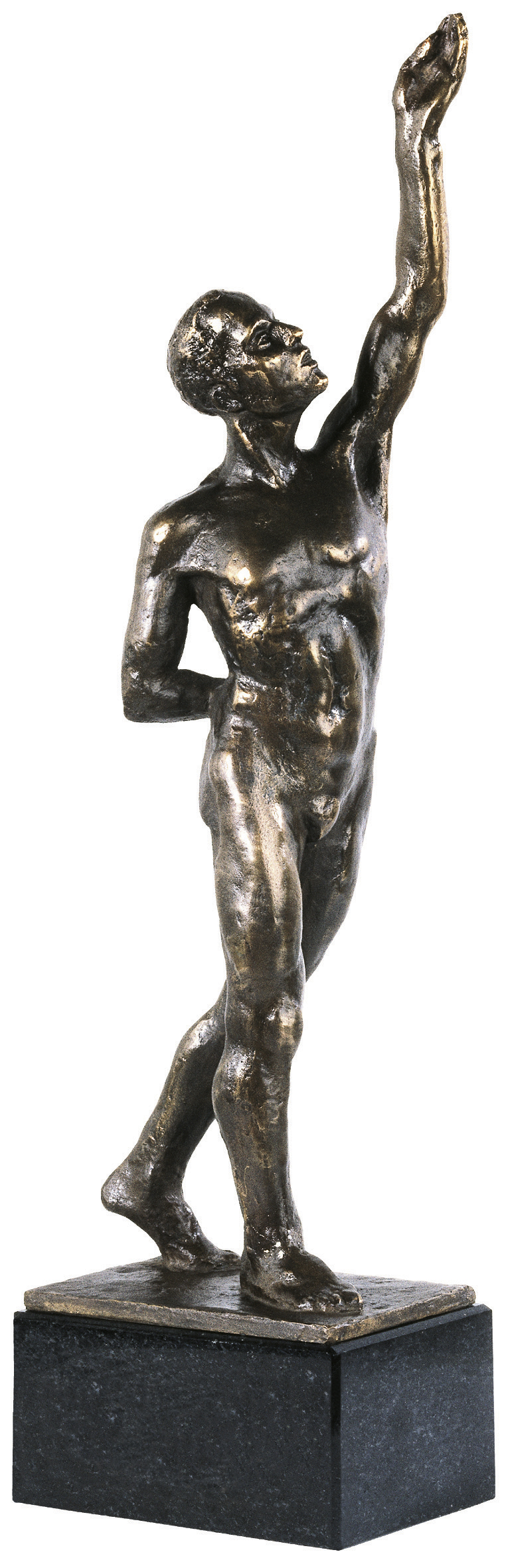 Preisstatue im Wettbewerb "Großer Preis des Mittelstandes"